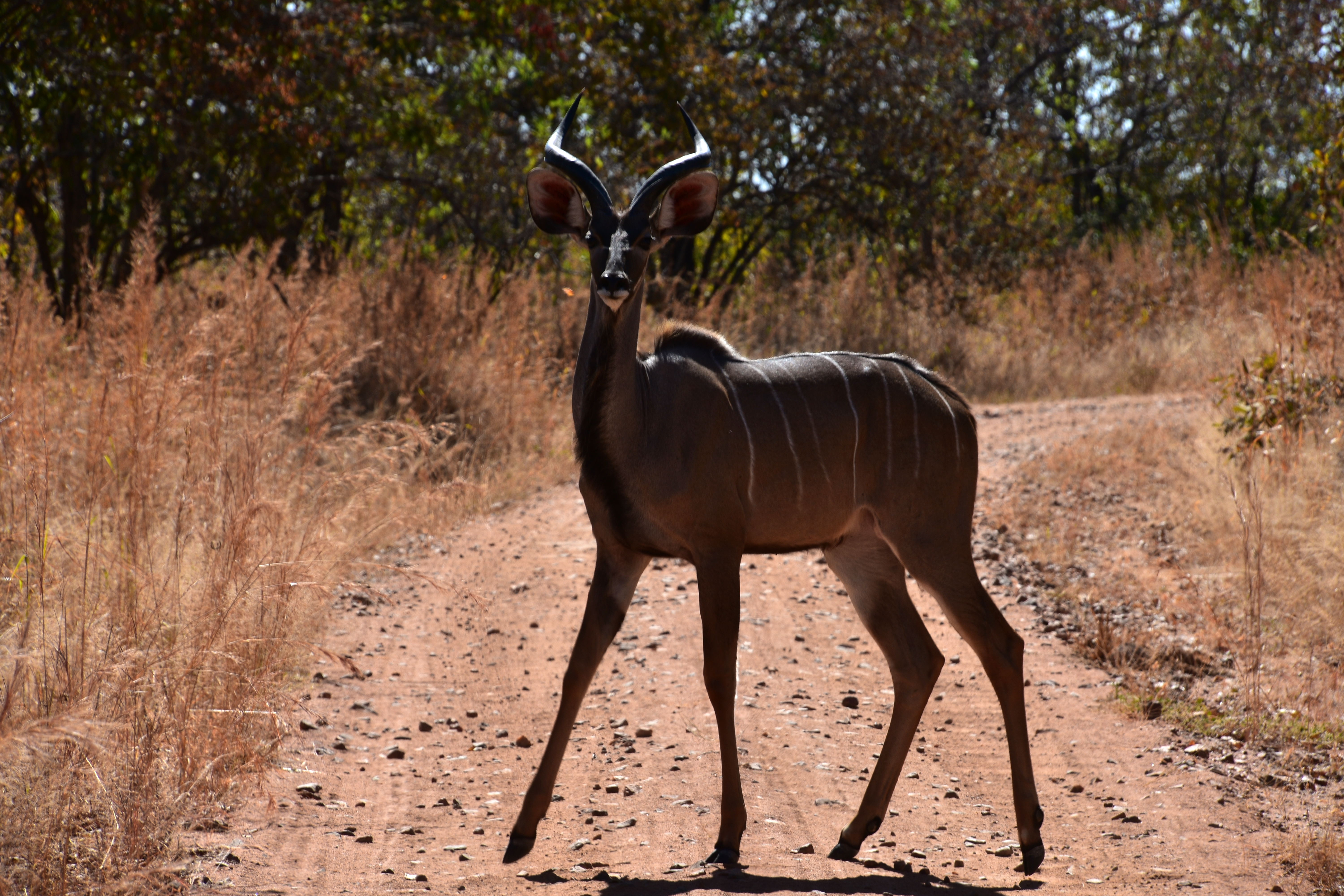 Kudu, Ruaha National Park (14)